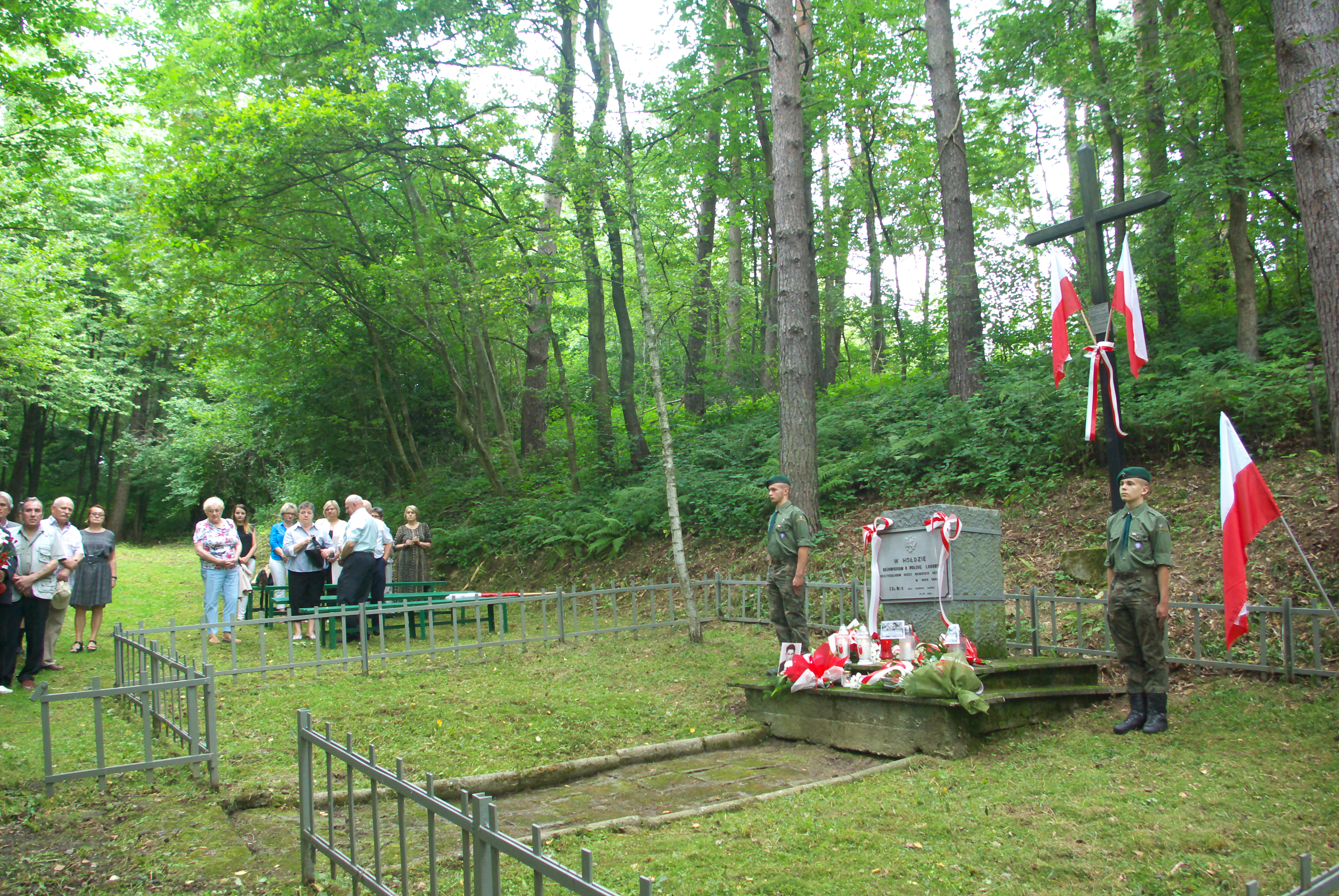 Miejsce pamięci w Hanusiskach pod Zagórzem, upamiętniające ofiary egzekucji dokonanej przez Niemców 27 lipca 1944. Zdjęcie z obchodów w dniu 27 lipca 2019.